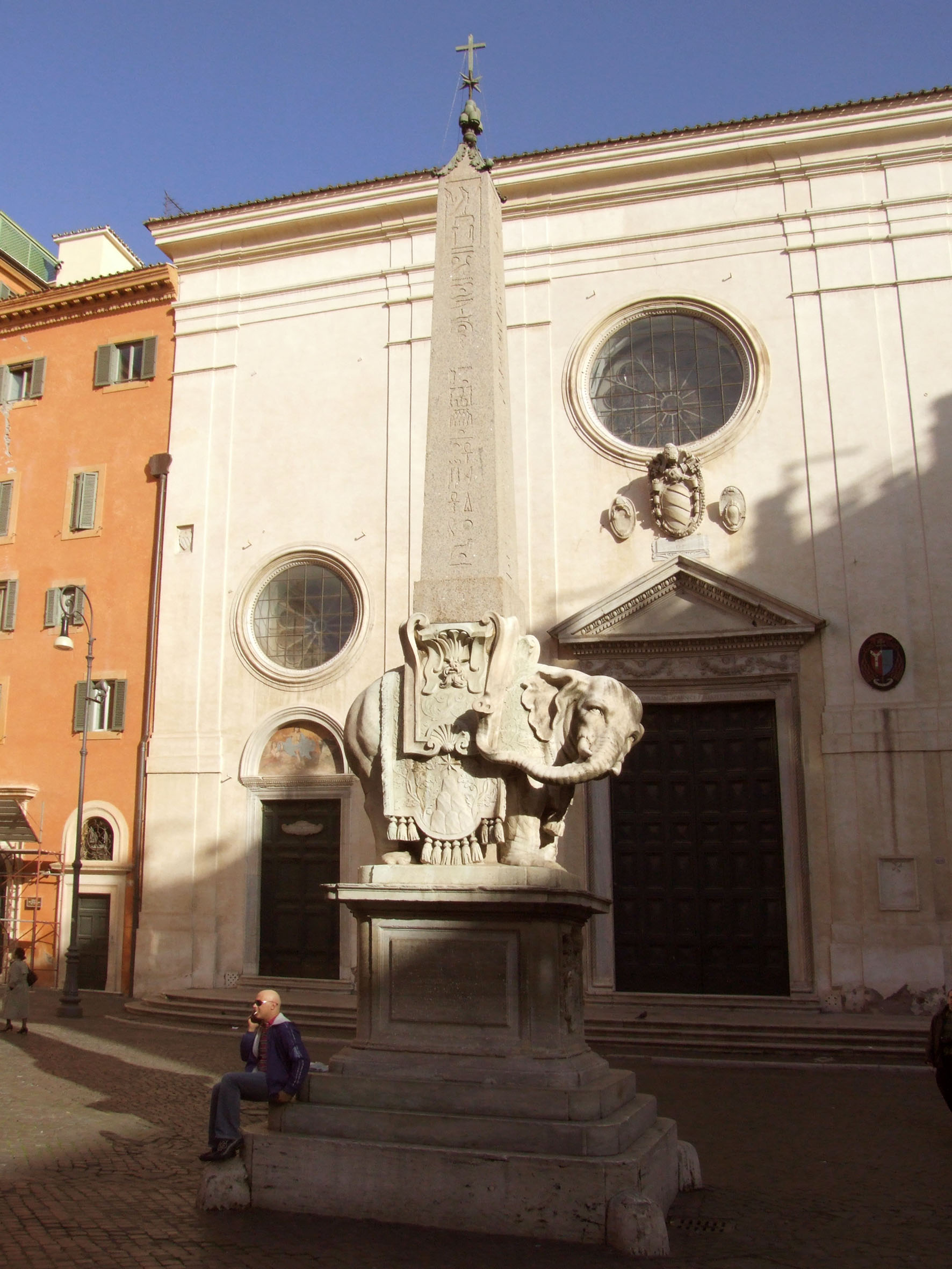 Berninis Elefant